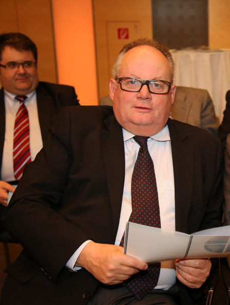 Christian Konrad, Franz Fischler-8908